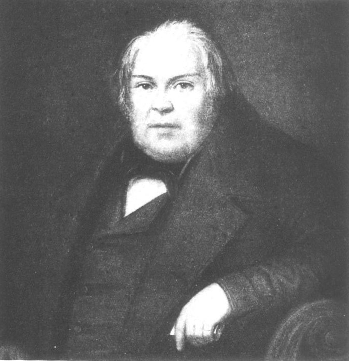 Karl Petter Lindbom (1787-1849), ägare till Hersby gård (Hersbyholm) på Lidingö från 1823-1849, porträtterad av E. Wahlbersson omkring 1840.